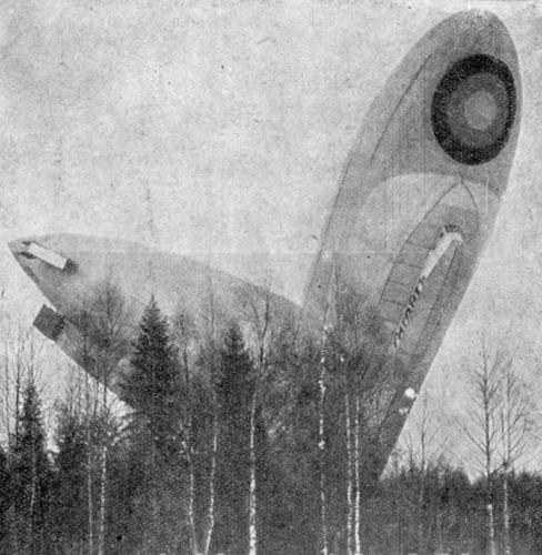 Авария дирижабля Гигант Российской империи